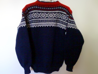 Mariusgenser